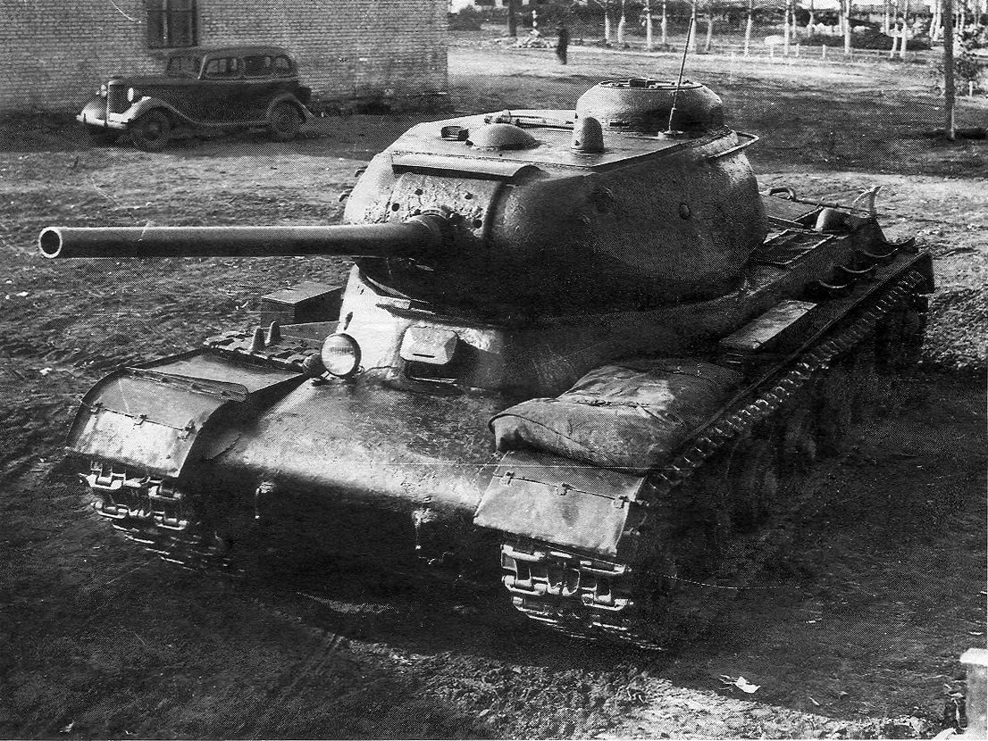 Tank IS-1 prototyp